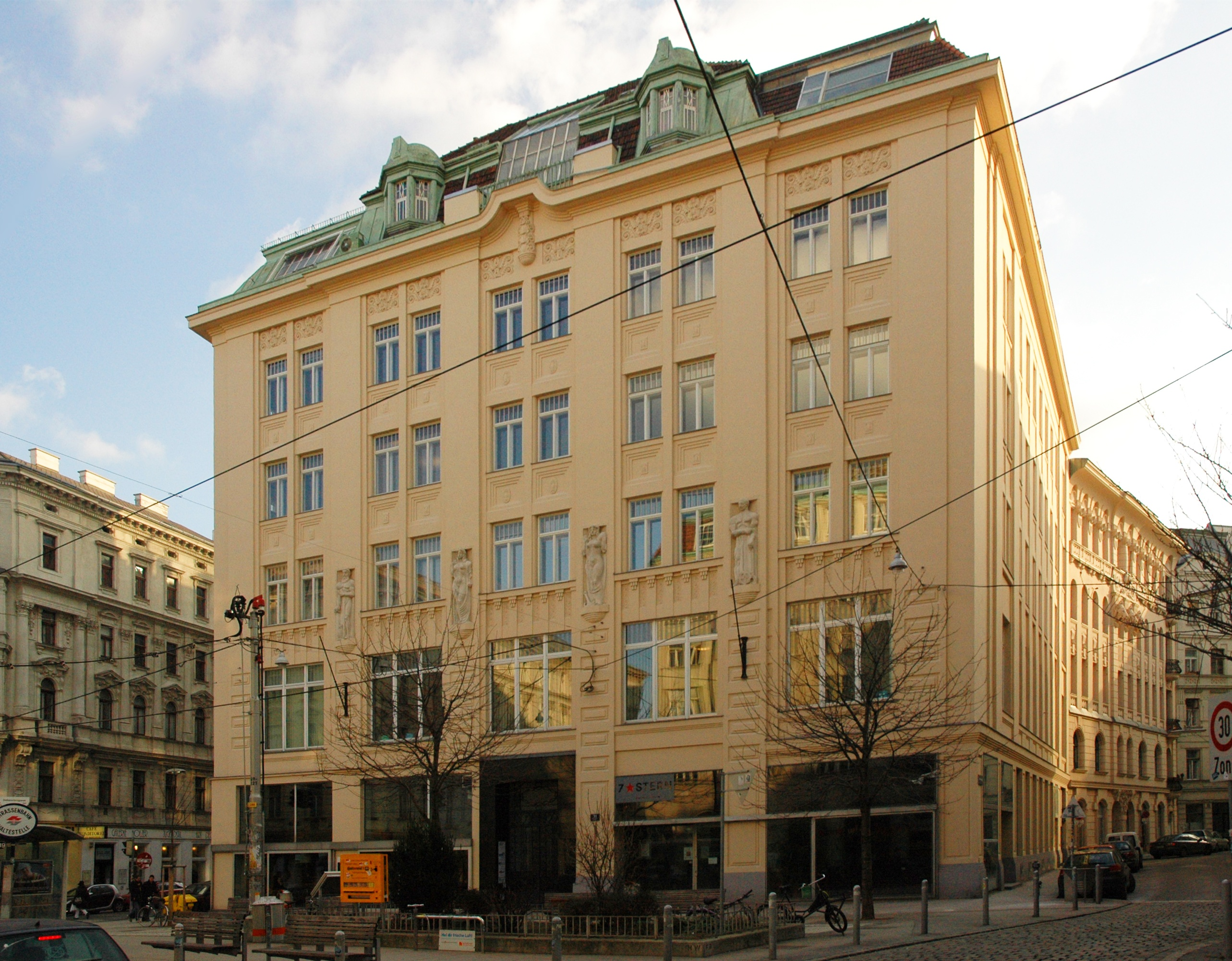 Ehemaliges Hauptgebäude der Sascha-Filmindustrie, Wien-Neubau, Siebensterngasse 31